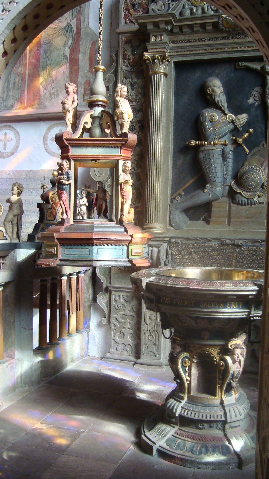 Lemgo, St. Nicolaikirche, Taufe